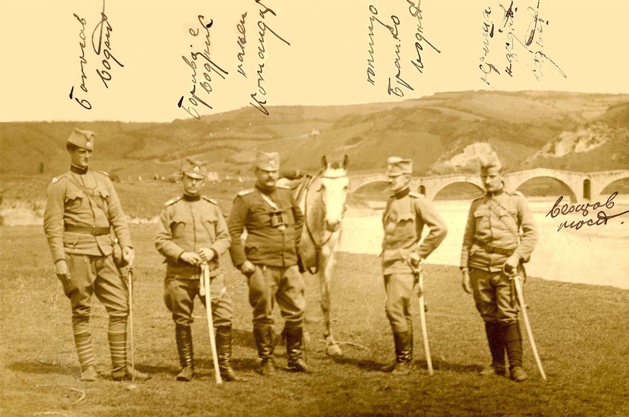 фотографија настала 1913.г. у предаху Другог балканског рата,поред Везировог моста у Албанији. Аутор је Владимир Бецић. Налази се у приватној колекцији.